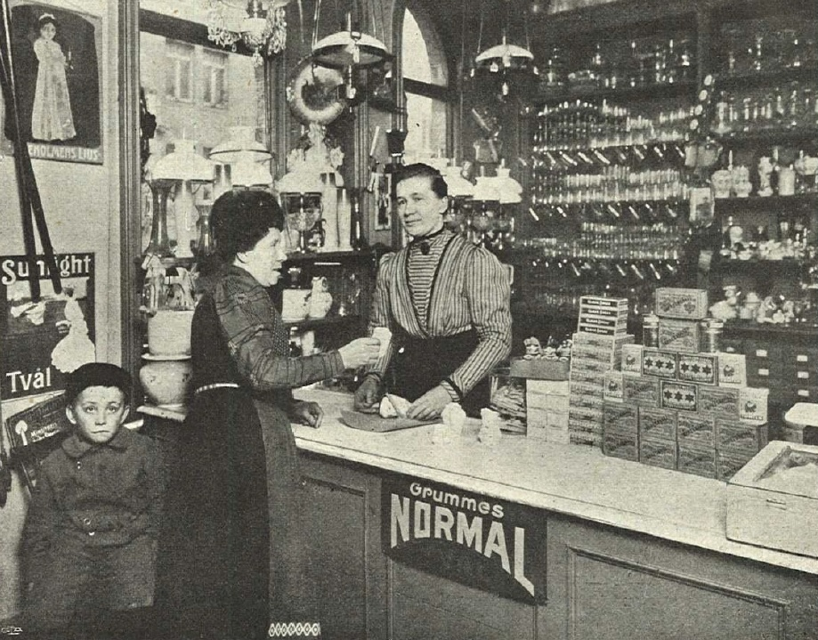 Gertrud Månsson ur tidningen Idunden 3 april 1910.